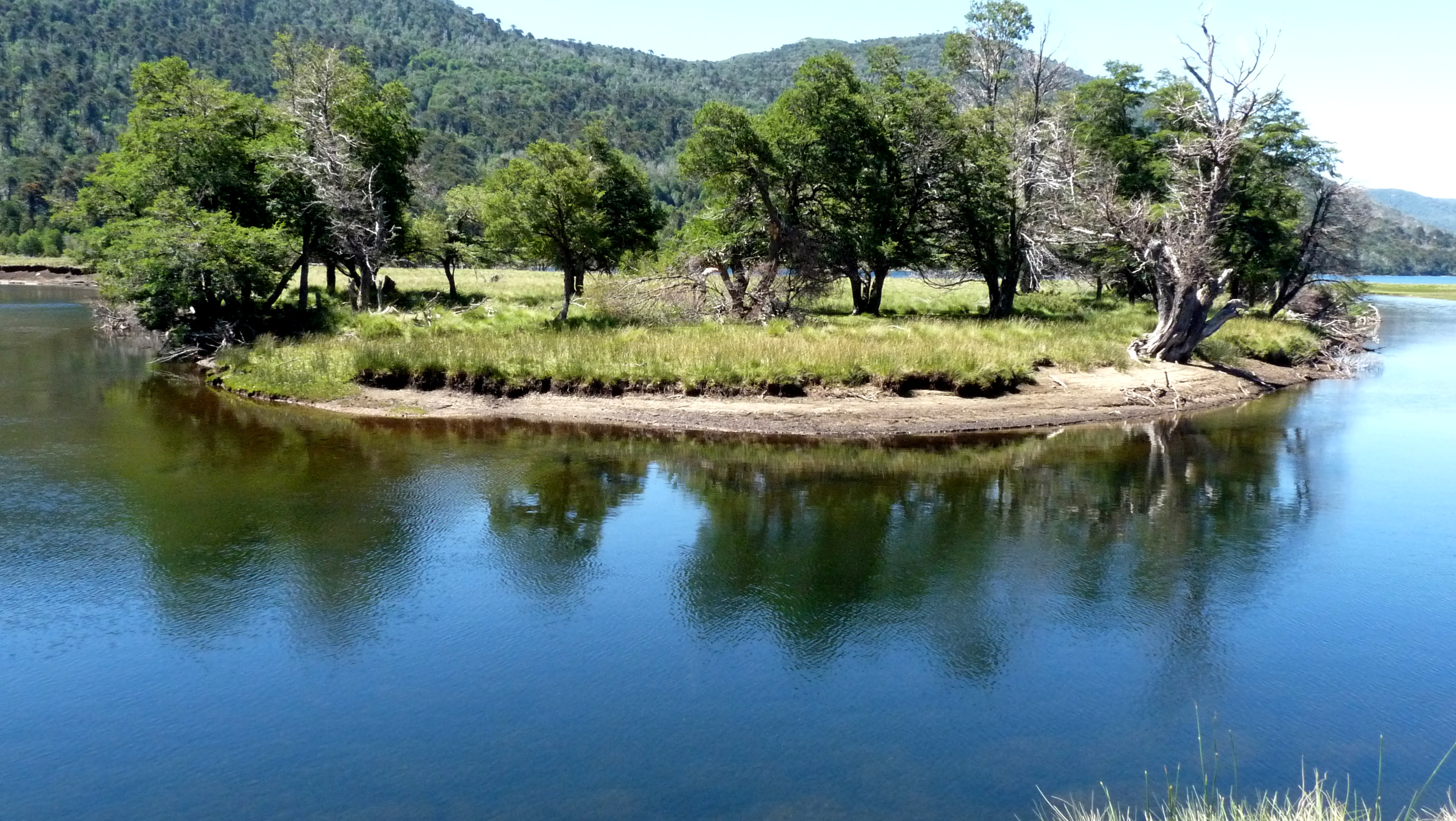 Este rincón del Ruca Choroi es de inigualable belleza